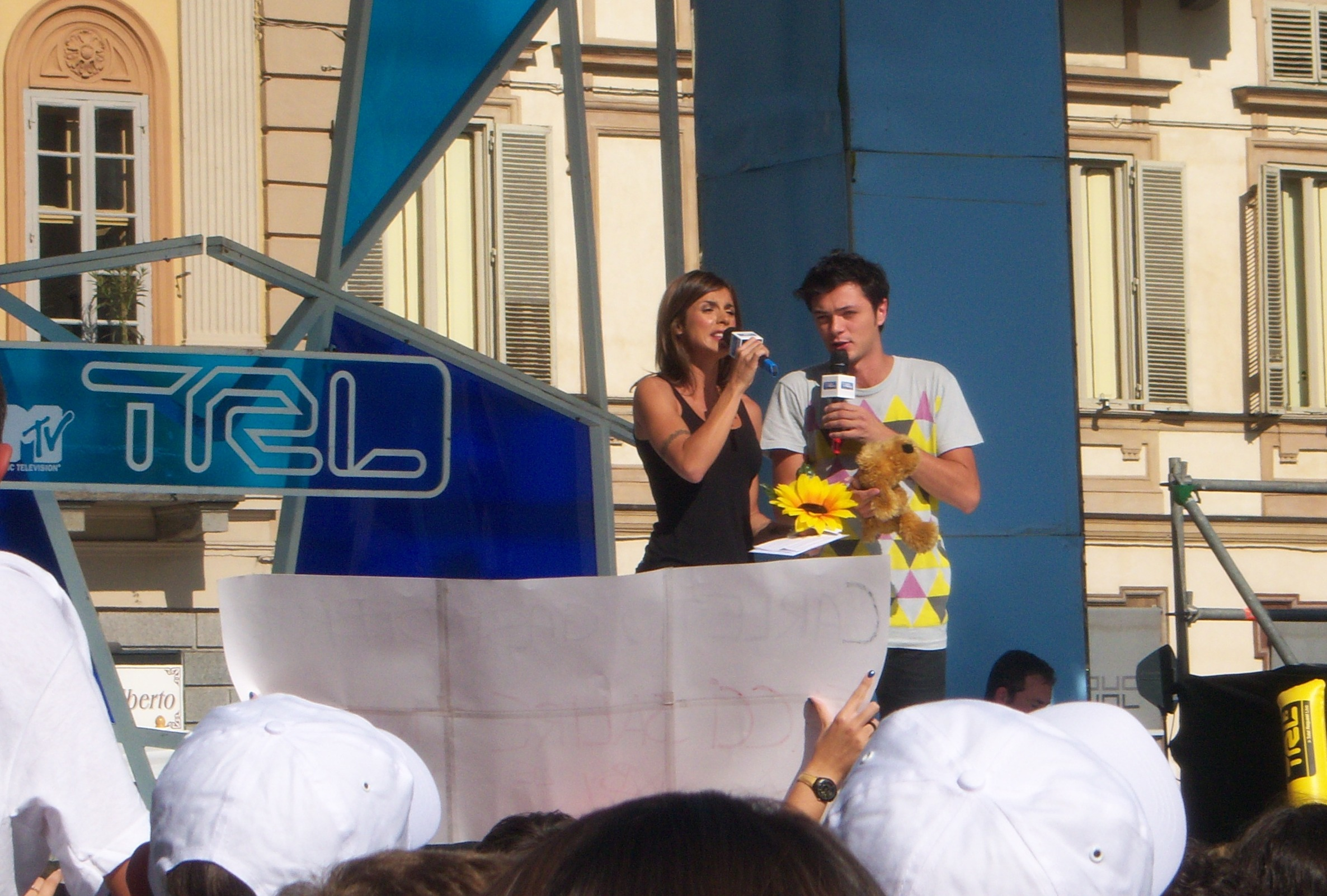 TRL Torino 29/09/09 : Elisabetta Canalis e Carlo Pastore